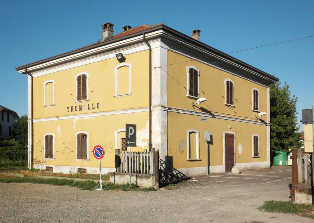 Stazione ferroviaria di Tromello